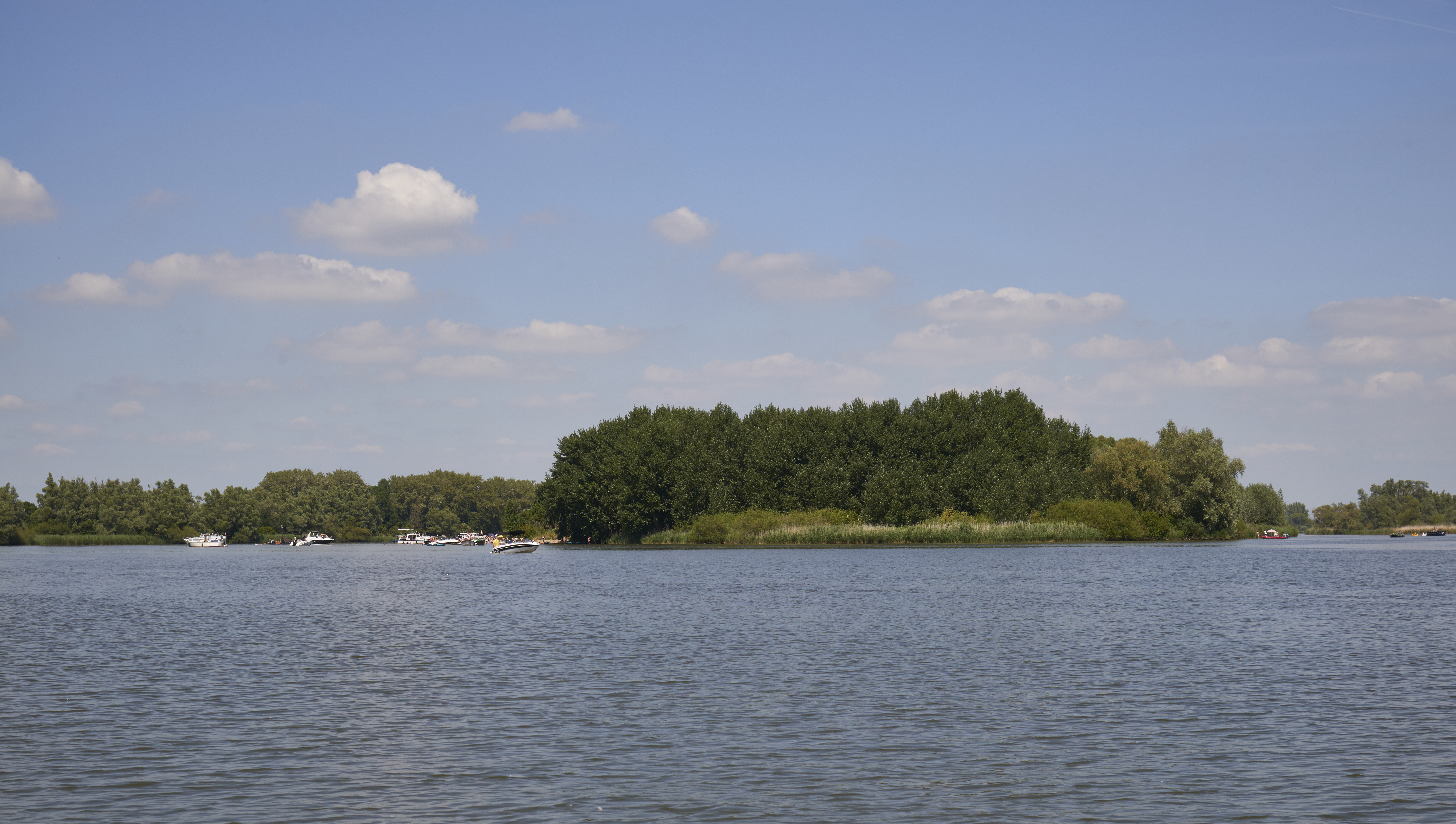 Eiland Rietplaat in een deel van de Biesbosch